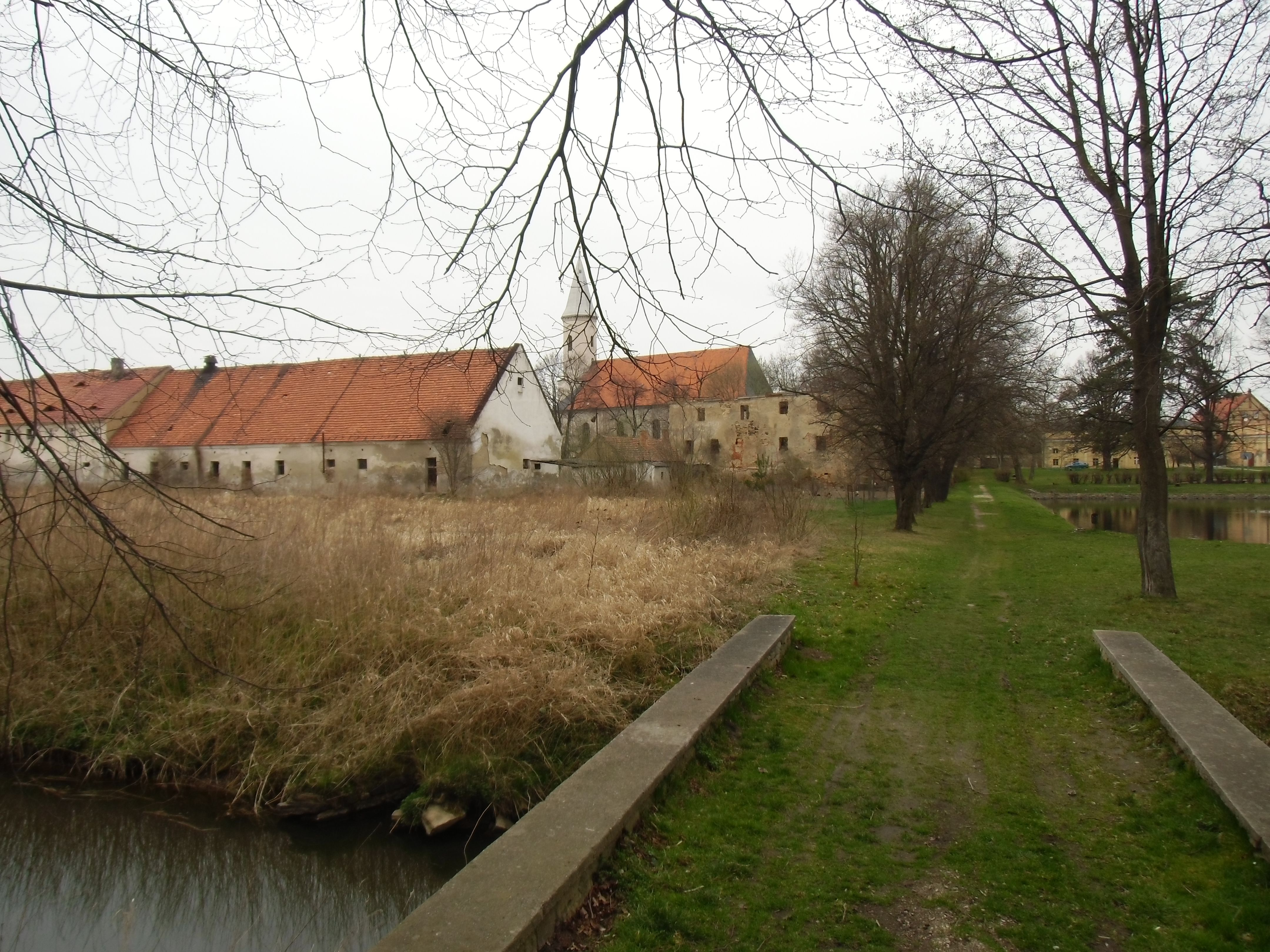 Mściwojów - zespół pałacowy (nr 40), XVI, XIX